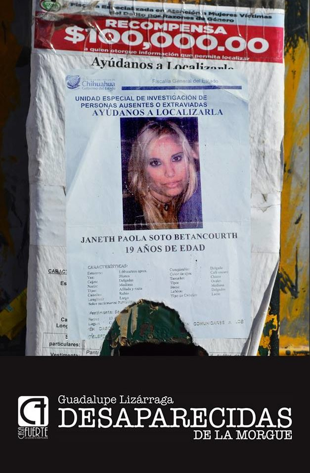 Portada